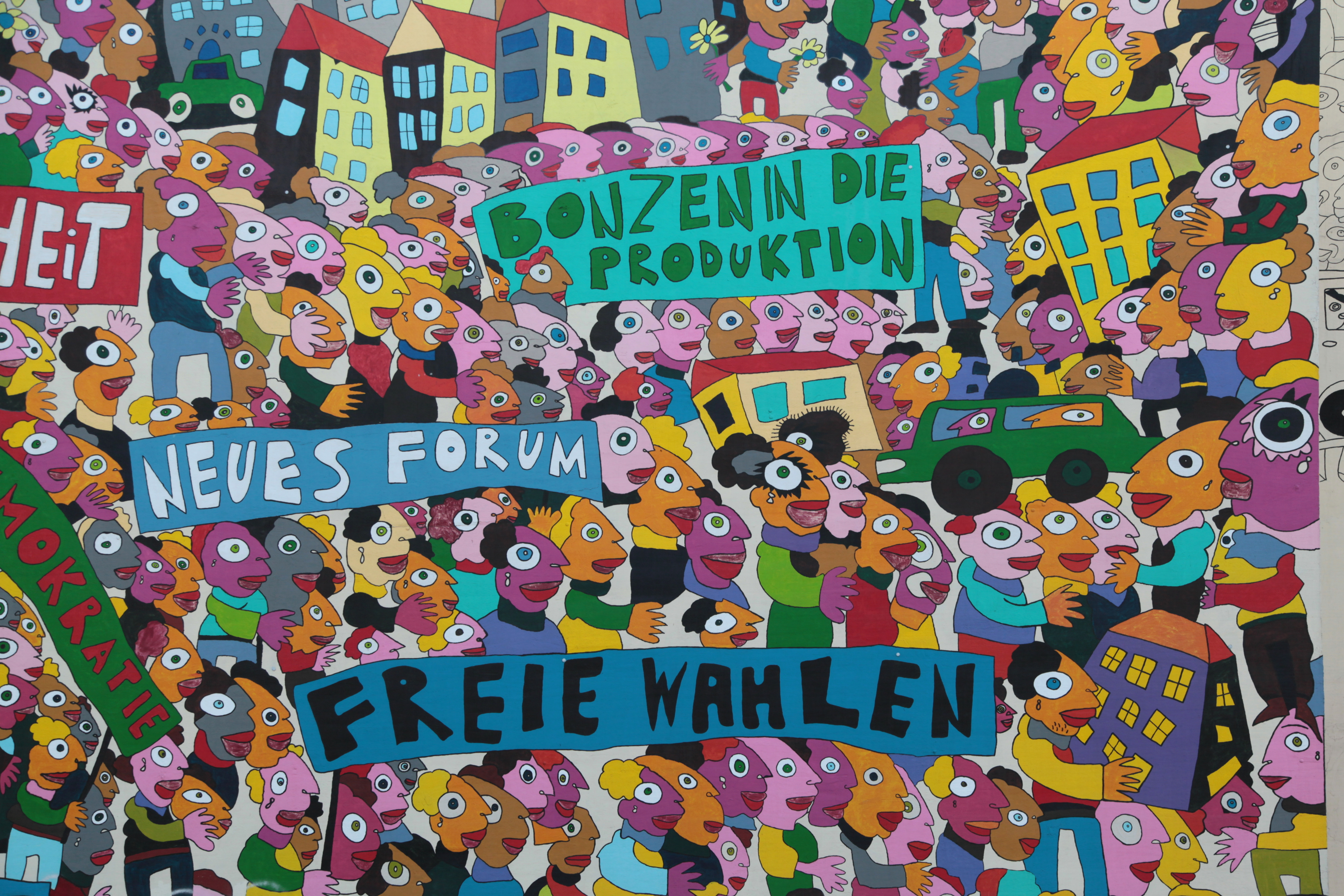 Brühl Arkade, Brühl in Leipzig